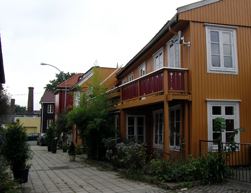 Hurdalsgata, Oslo.